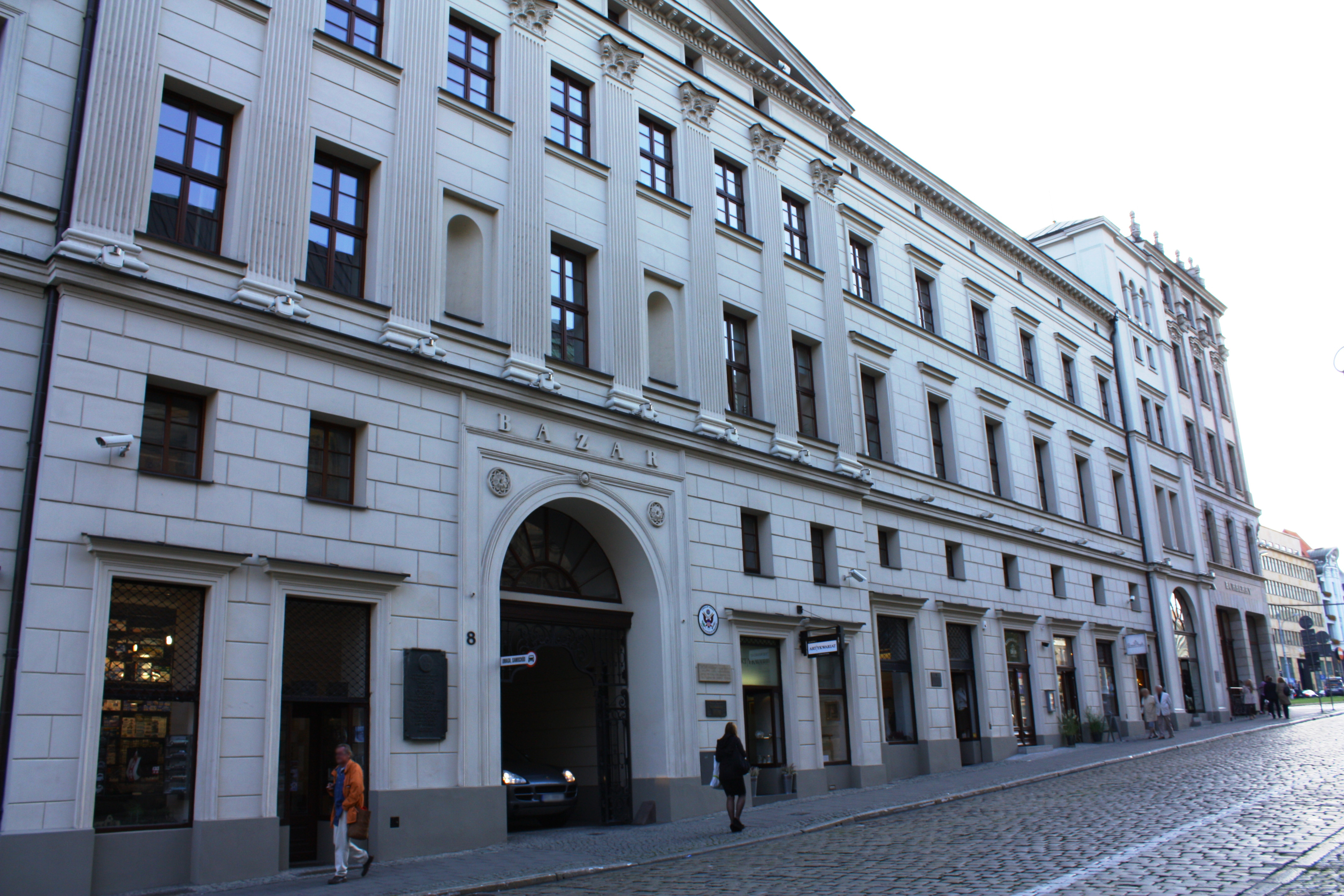 Poznań, ul. Paderewskiego 8 / al. Marcinkowskiego 10 - Hotel Bazar (zabytek nr A 016)